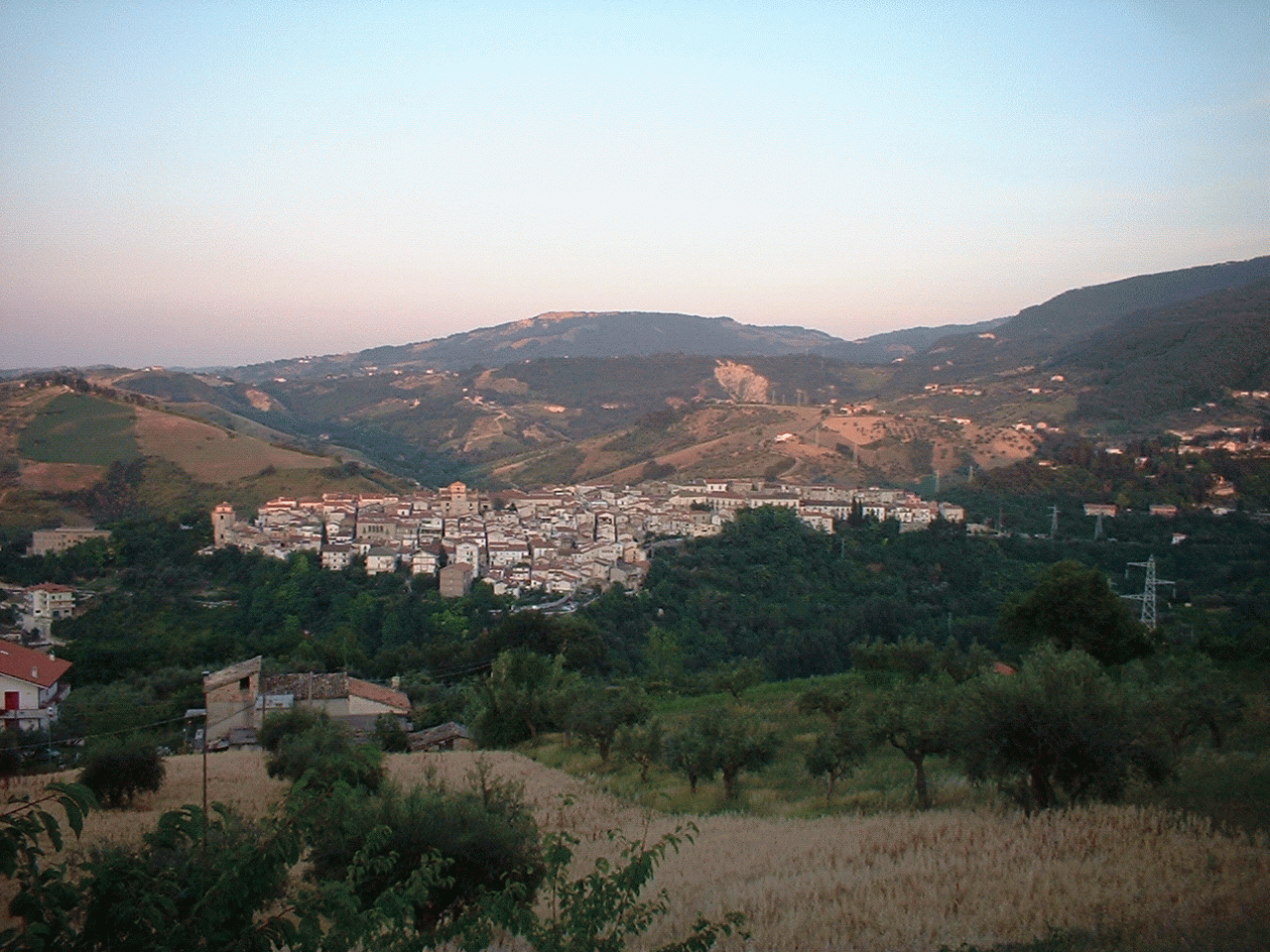 Foto di Manoppello (PE)-Italy. Foto scattata da Alan_p.